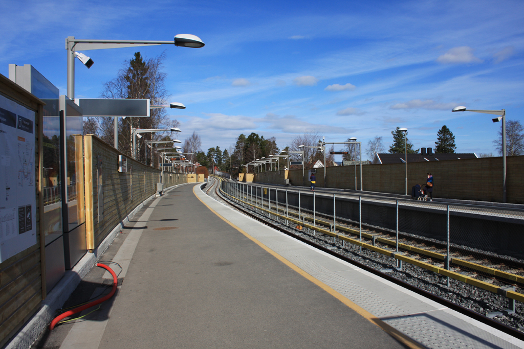 Karlsrud T-banestasjon fra Spor 1, men i bilderetning mot Brattlikollen. Stasjonen har et delvis meget midlertidig utseende pga en naboinnsigelse til utforming av stasjonen.